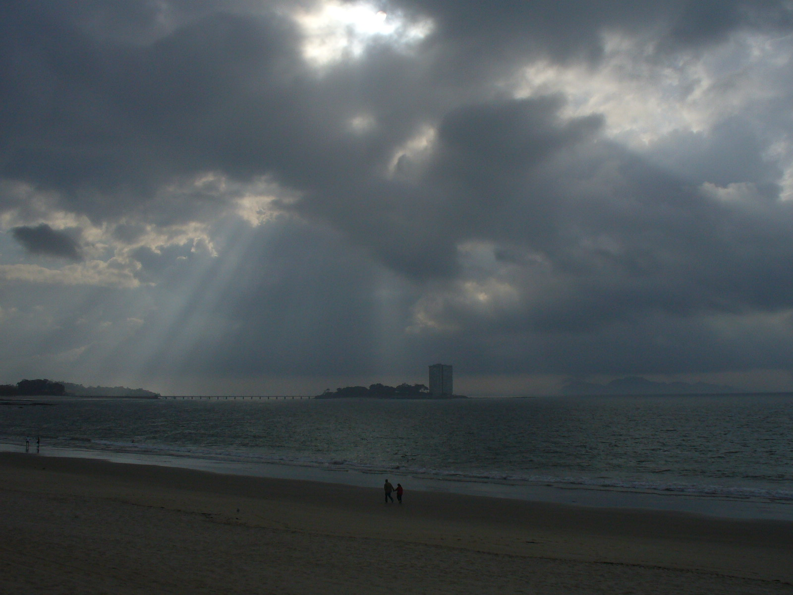 Strando Samil, Vigo (Galegio)